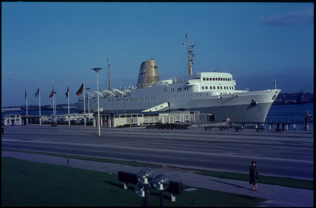 am Oslokai.